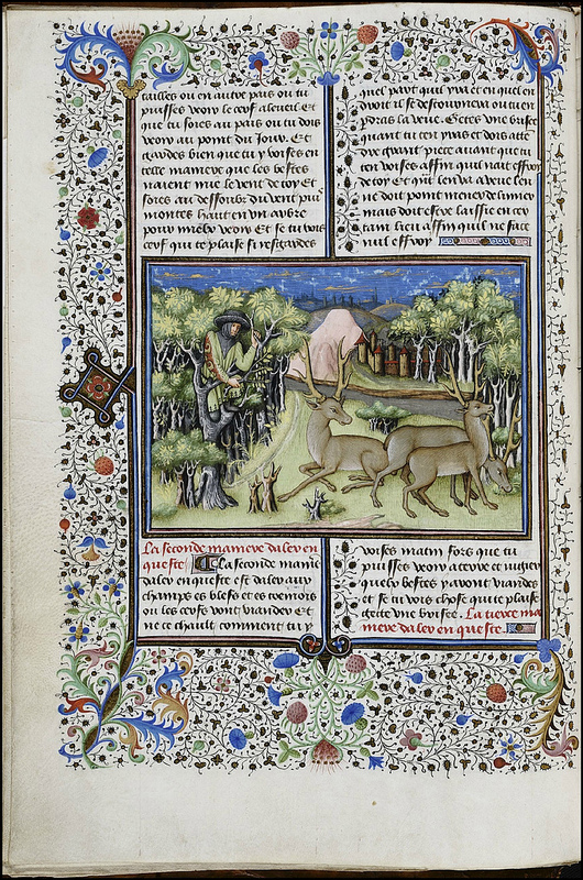 Master of Girart de Roussillon with The Book of the Hunt of King Modus